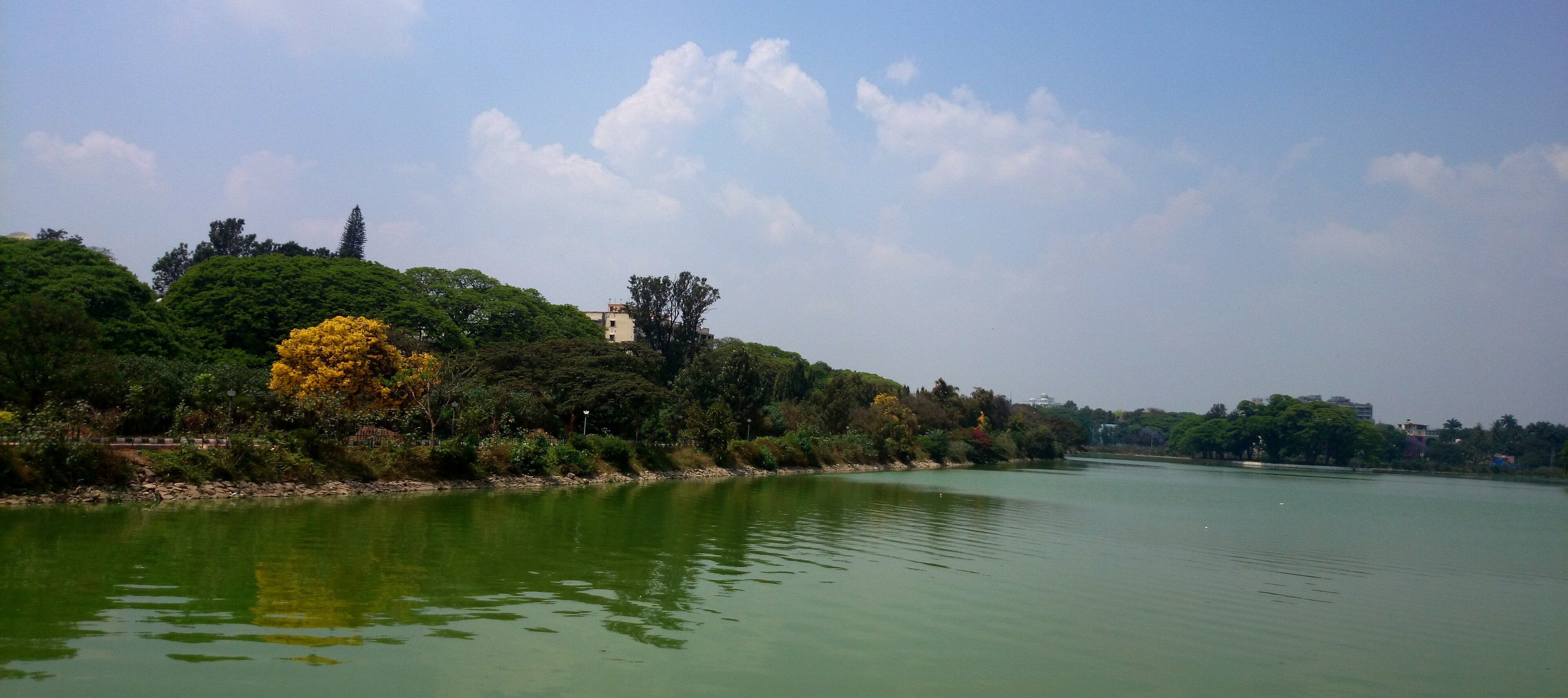 Bangalore Karnataka India 2014